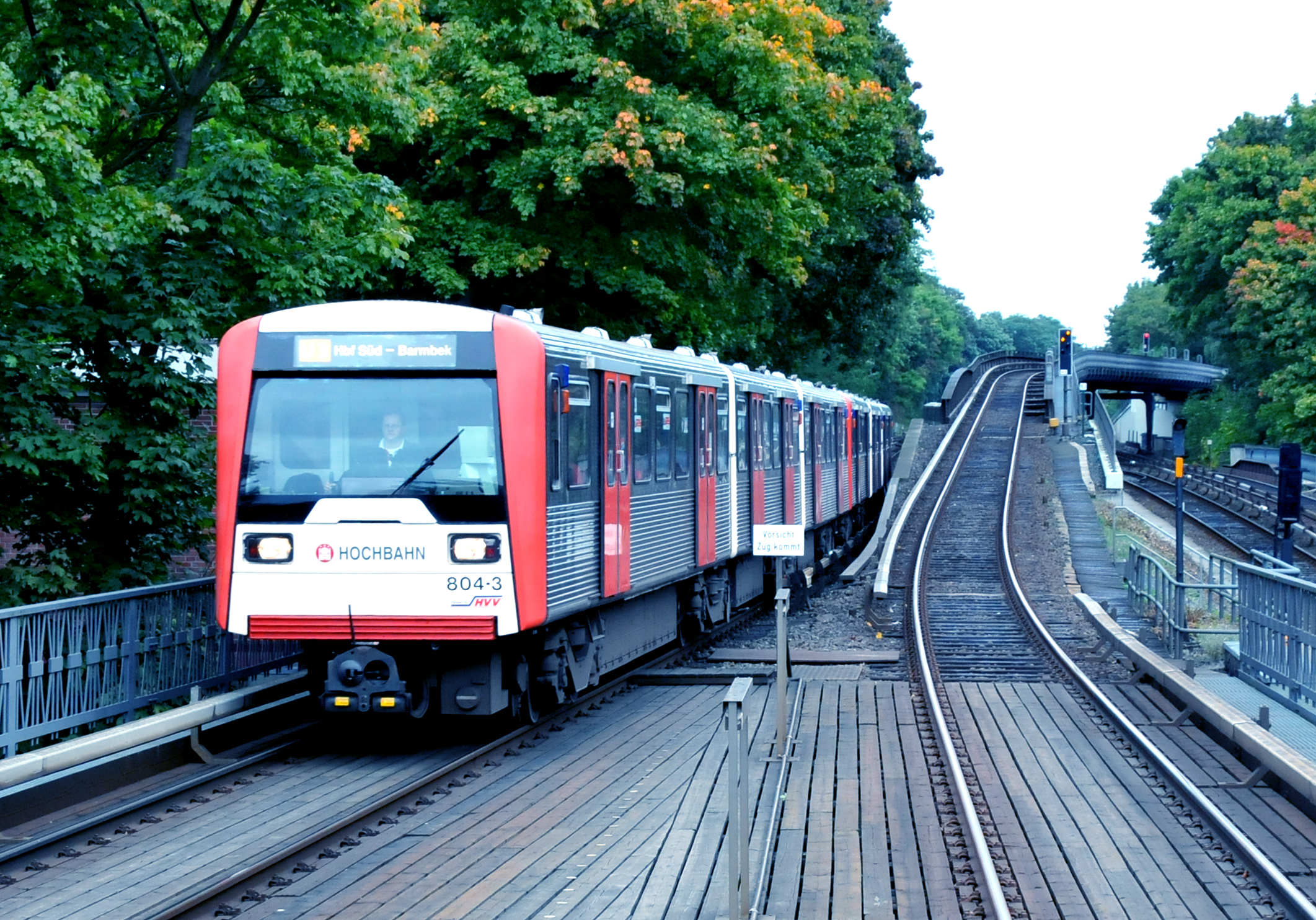 Hamburger Hochbahn treinstel van het type DT3 tijdens parade te Eppendorfer Baum.